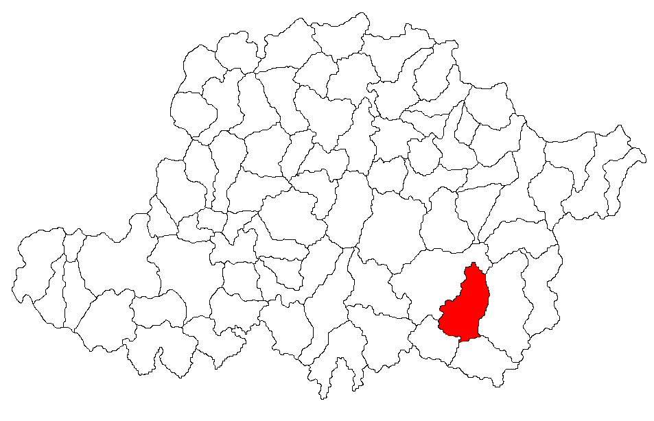 Categorie:Hărţi ale judeţului Arad